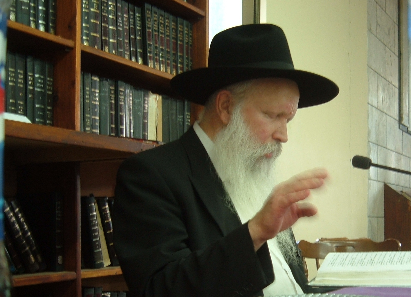 rabi ginsburg